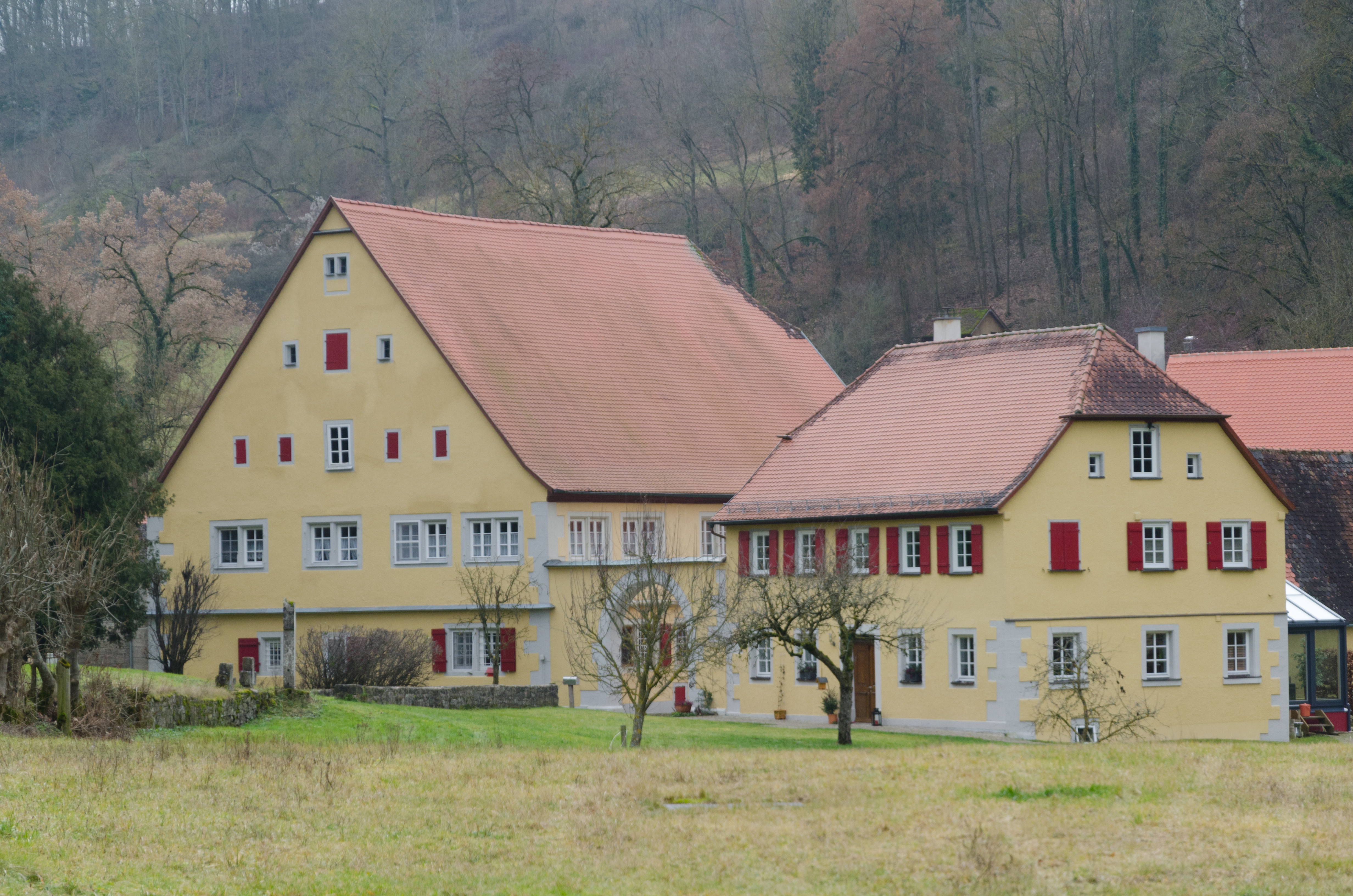 Rothenburg ob der Tauber, Taubertalweg 50ab